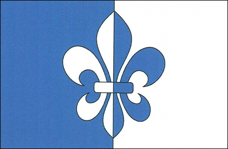 vlajka, Pohnání, okres Tábor